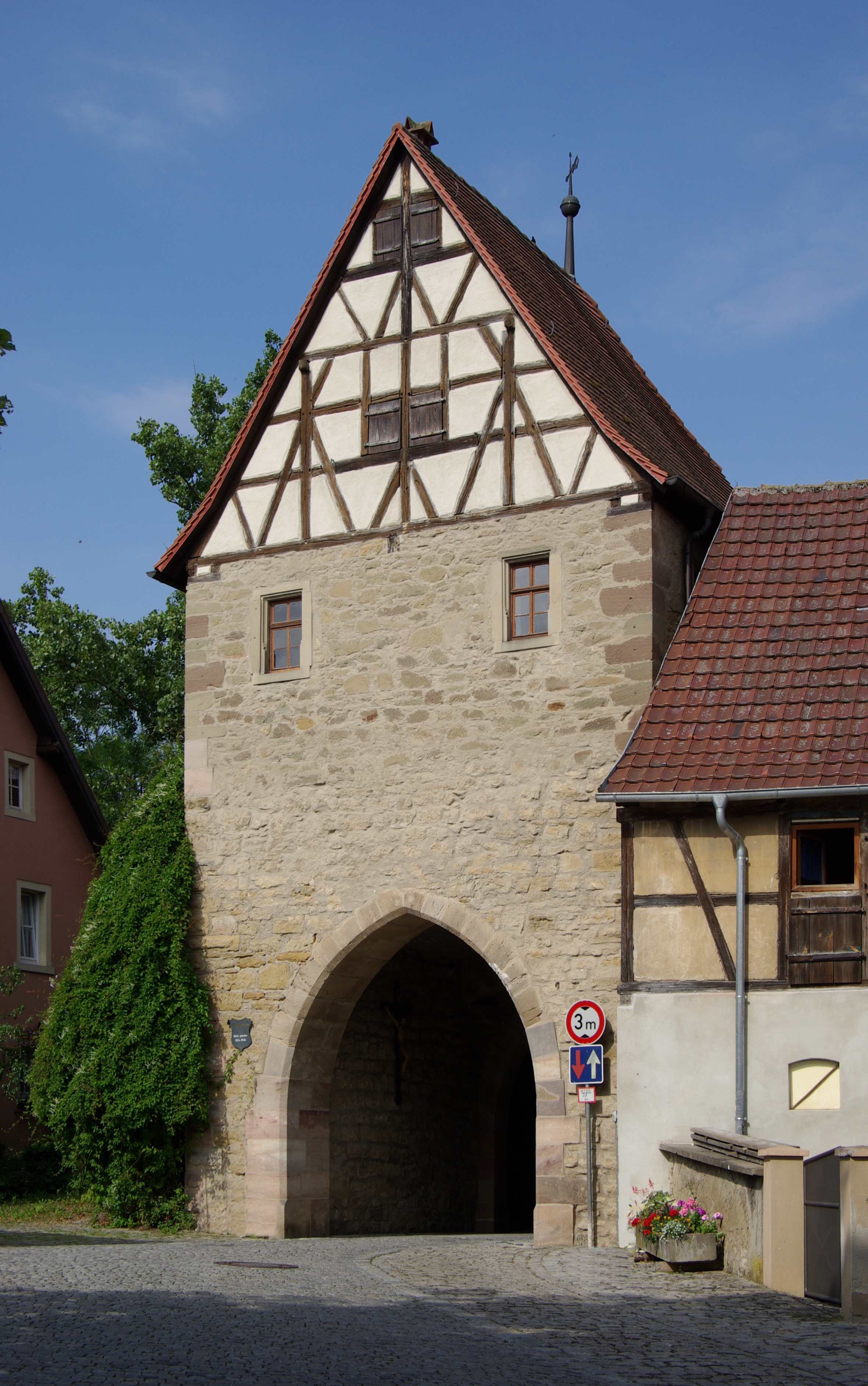 Iphofen, Mainbernheimer Tor, Stadtseite. Auch Spitaltor oder Äußeres Gräbentor genannt. Entstehungszeit 1533 bis 1548